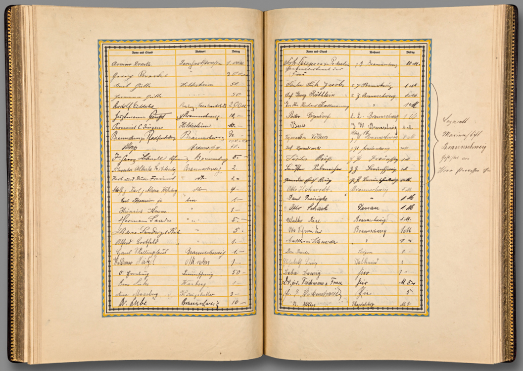 Braunschweig, Heinrich der Löwe in Eisen: Seite des „Goldenen Buches“ mit Einträgen aus dem Lazarett Marienstift.